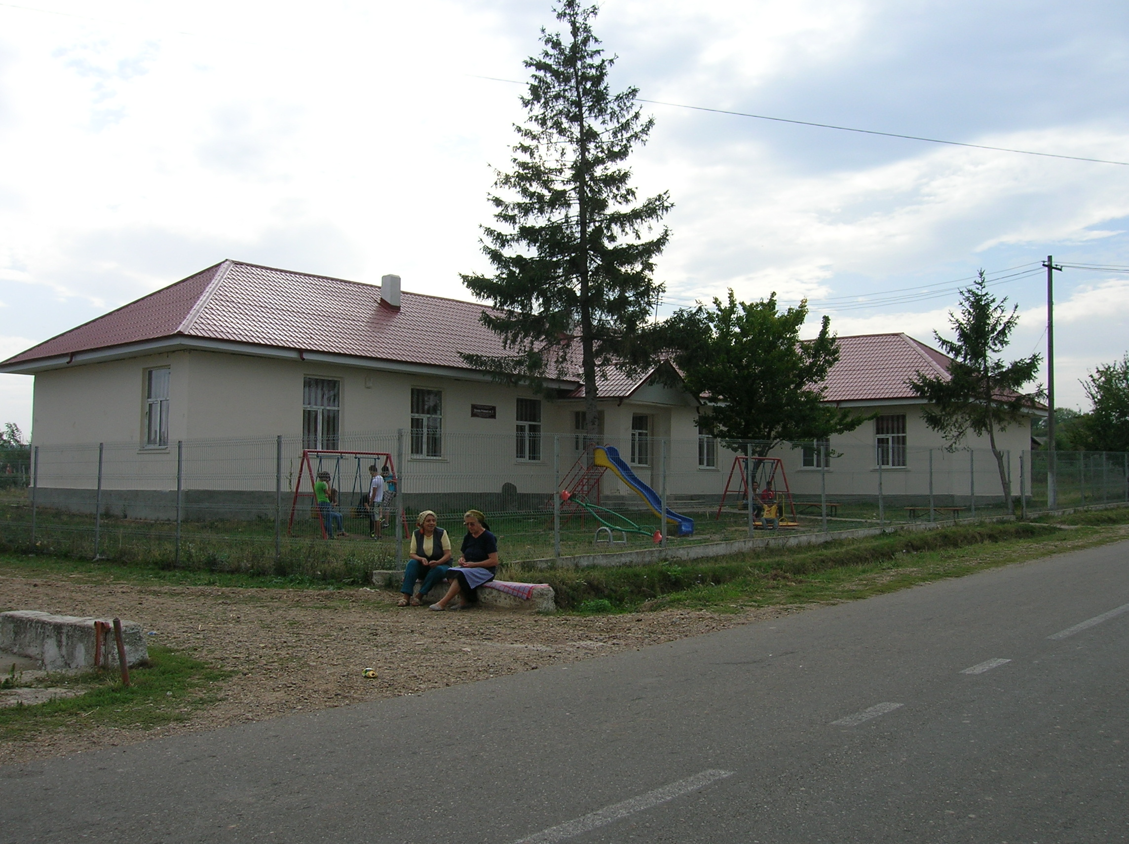 Comuna Valea Seacă Bacău - Satul Mândişca - Şcoala cu clasele I-IV Nr. 2